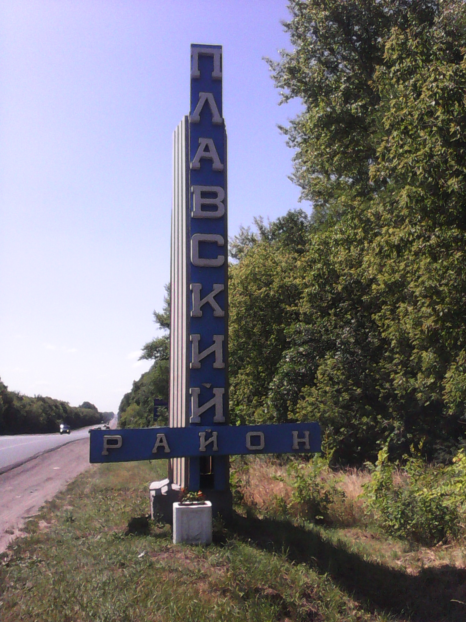 стела Плавский район